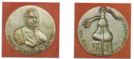 Szikvízgyártók Országos Ipartestülete Jedlik Ányos-díja